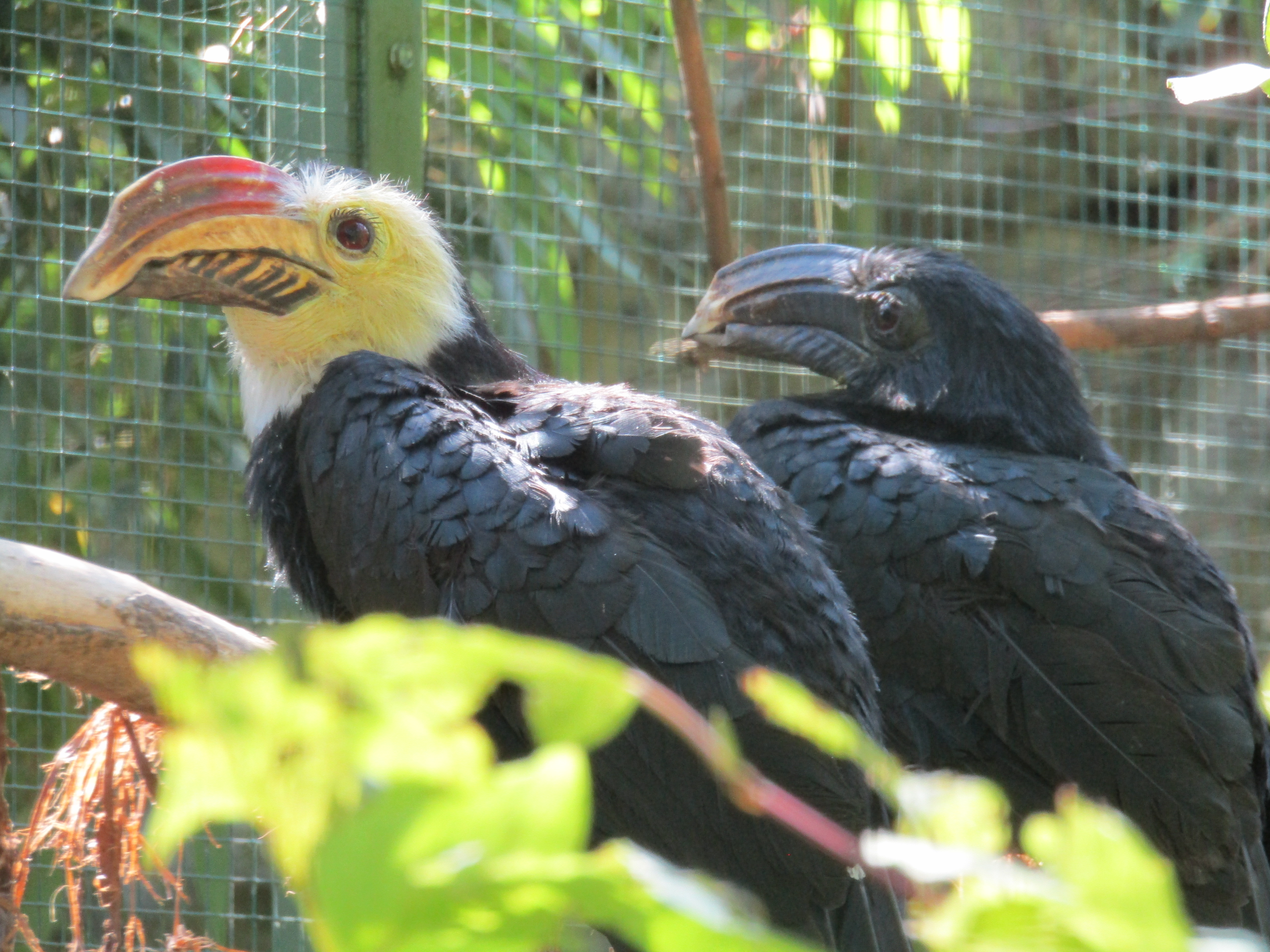 Zoborožec celebeský (Penelopides exarhatus) v ZOO Plzeň (samec a samice)